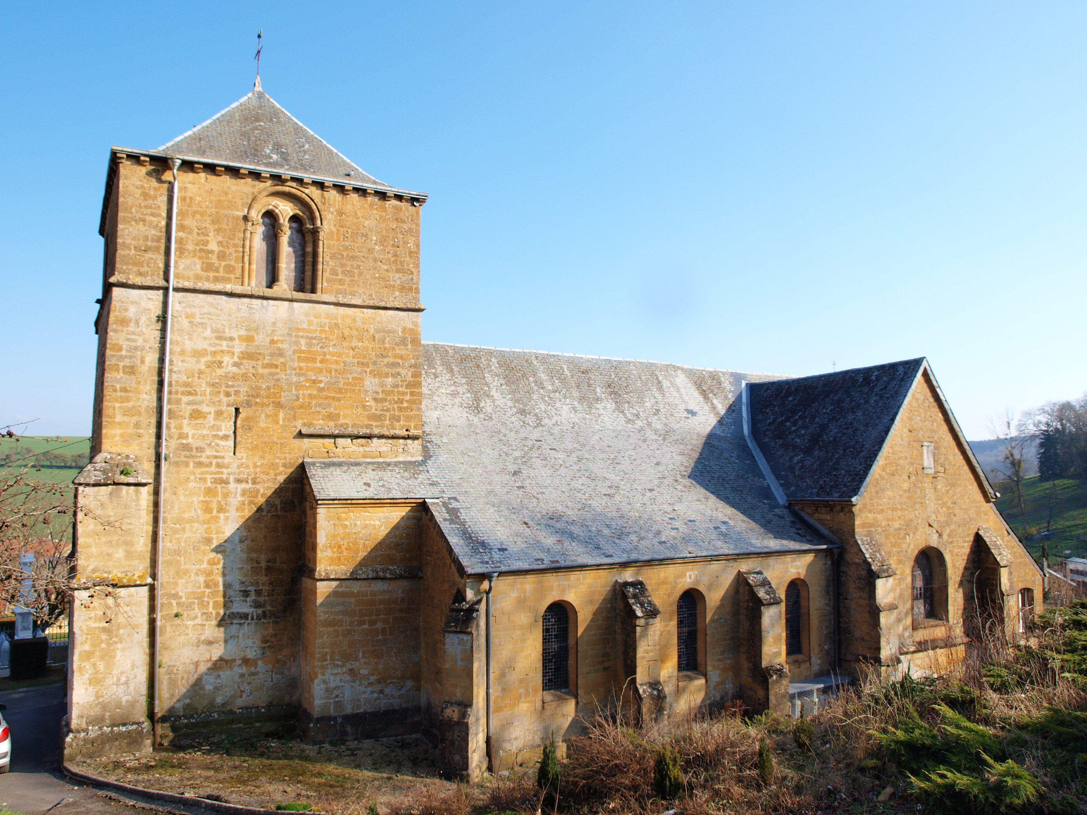 Sapogne-et-Feuchères (Ardennes, France)